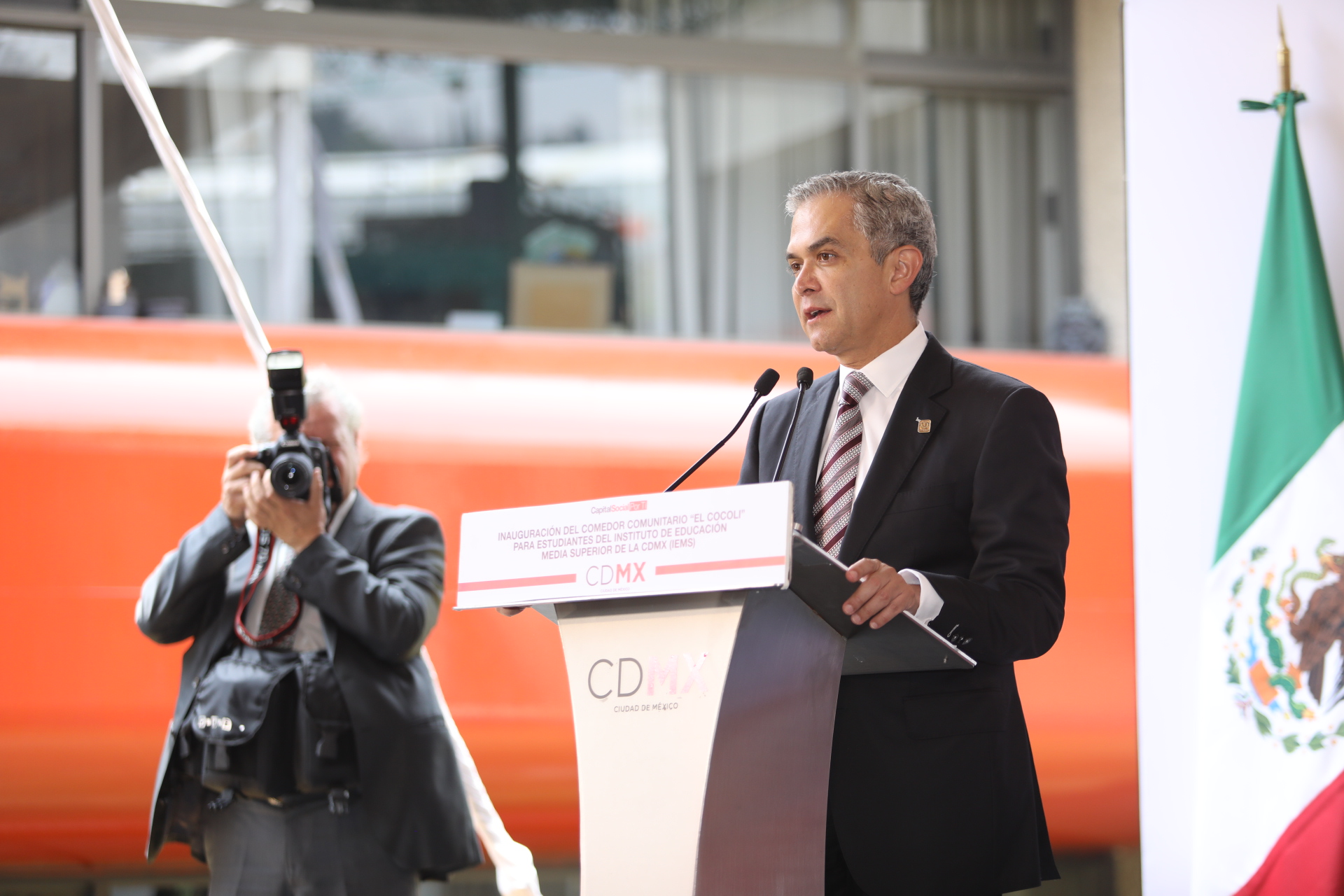 Premio de Ingeniería CDMX 2017